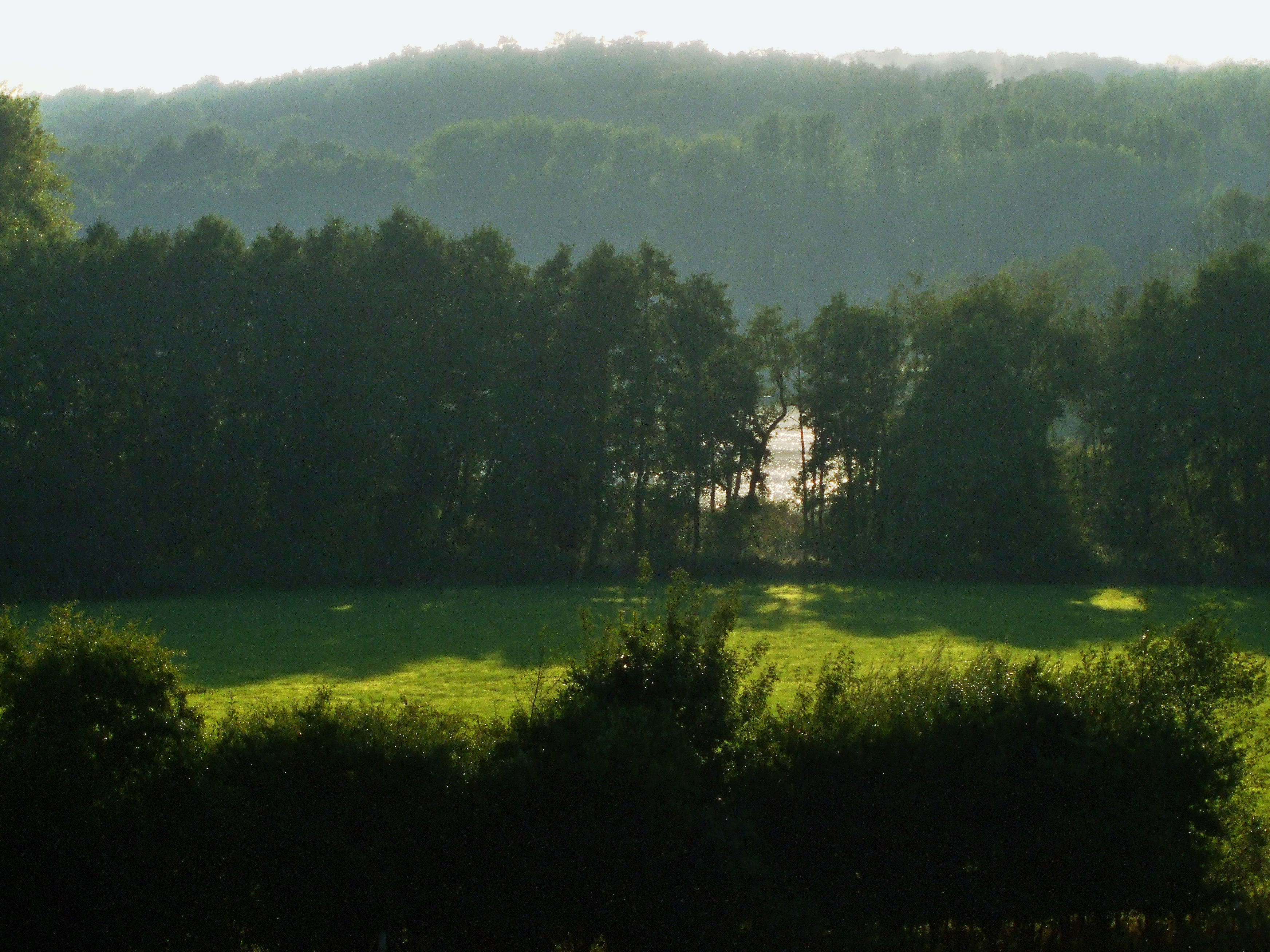 Landschaftliche Einbettung mit dem Bellenberg im Hintergrund.